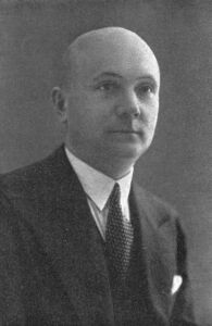 Karolis Žalkauskas (1892 m. gegužės 29 d. Šukionių dvare, Pakruojo valsčius, Šiaulių apskritis, Rusijos imperija – 1961 m. rugsėjo 16 d. Vašingtone, JAV) – Lietuvos teisininkas, politinis bei visuomenės veikėjas.